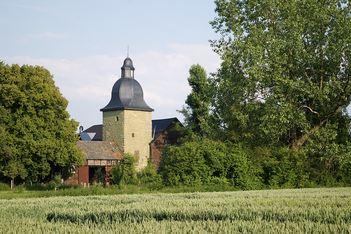 Haus von der Recke in Unna-Westhemmerde, Turm